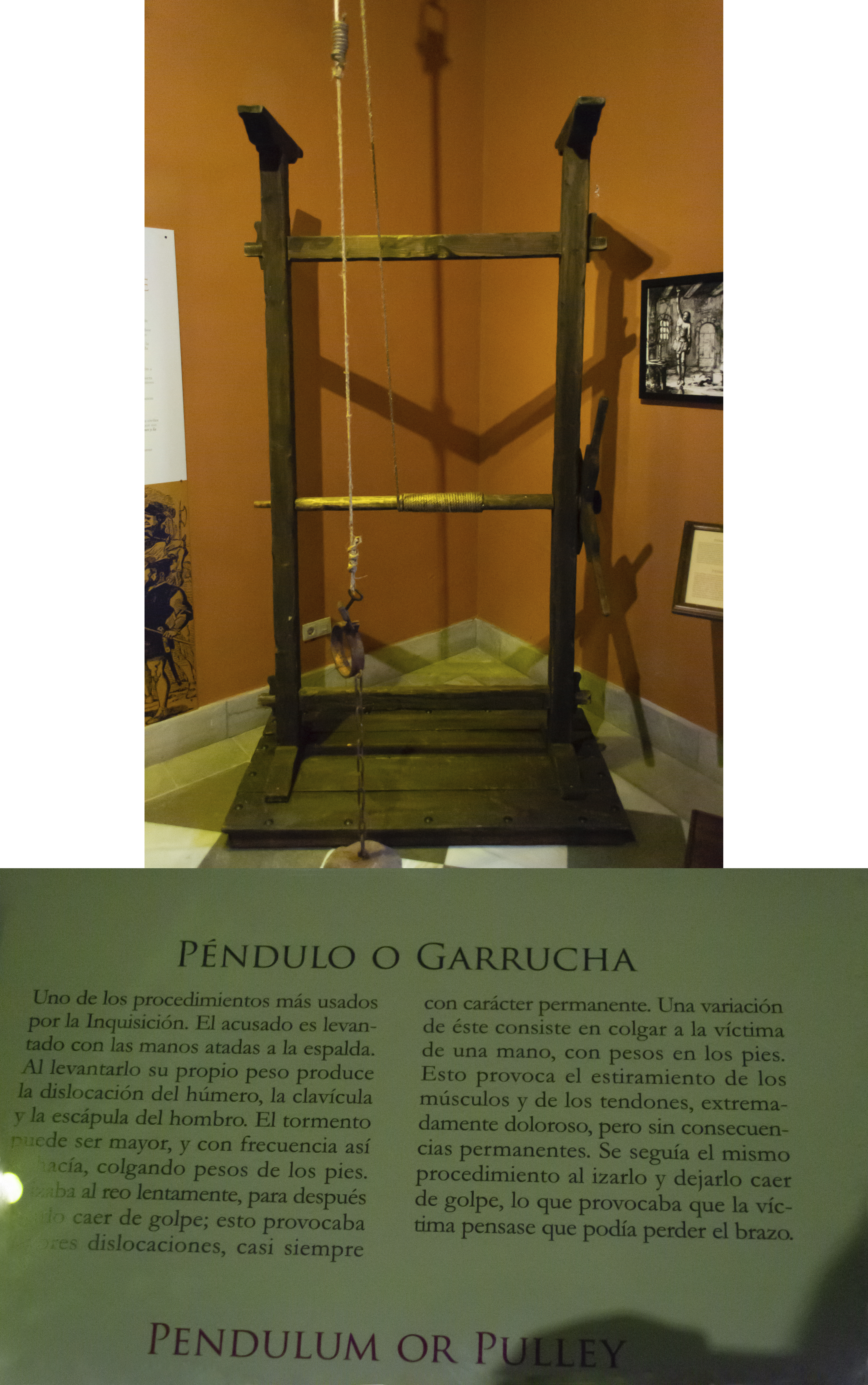 Péndulo o garrucha. Antiguo instrumento de tortura. Exposición Inquisición en el Palacio de los Olvidados de Granada.